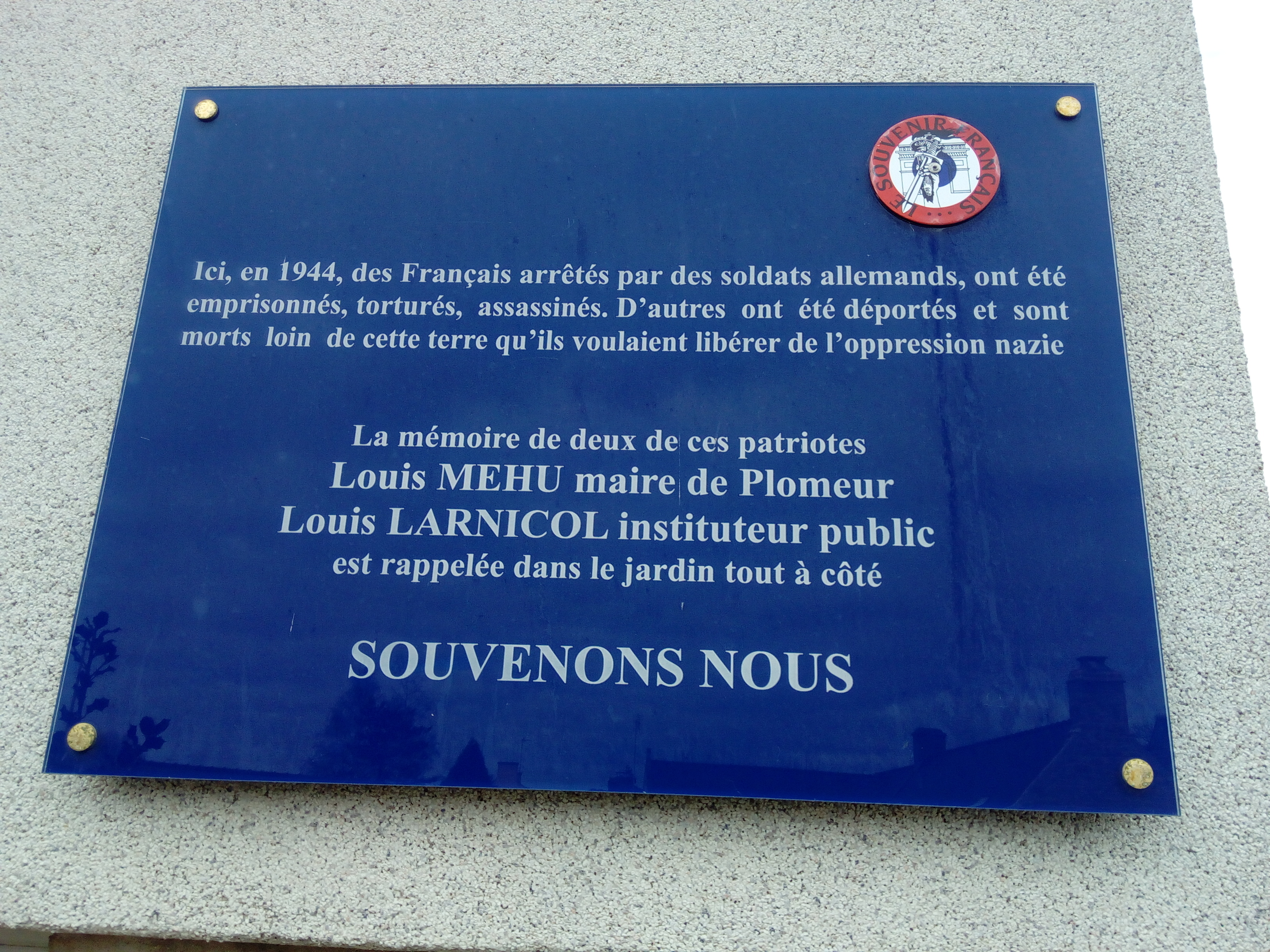 Plaque commémorative des horreurs perpétrées dans l'école, devenue prison en 1944